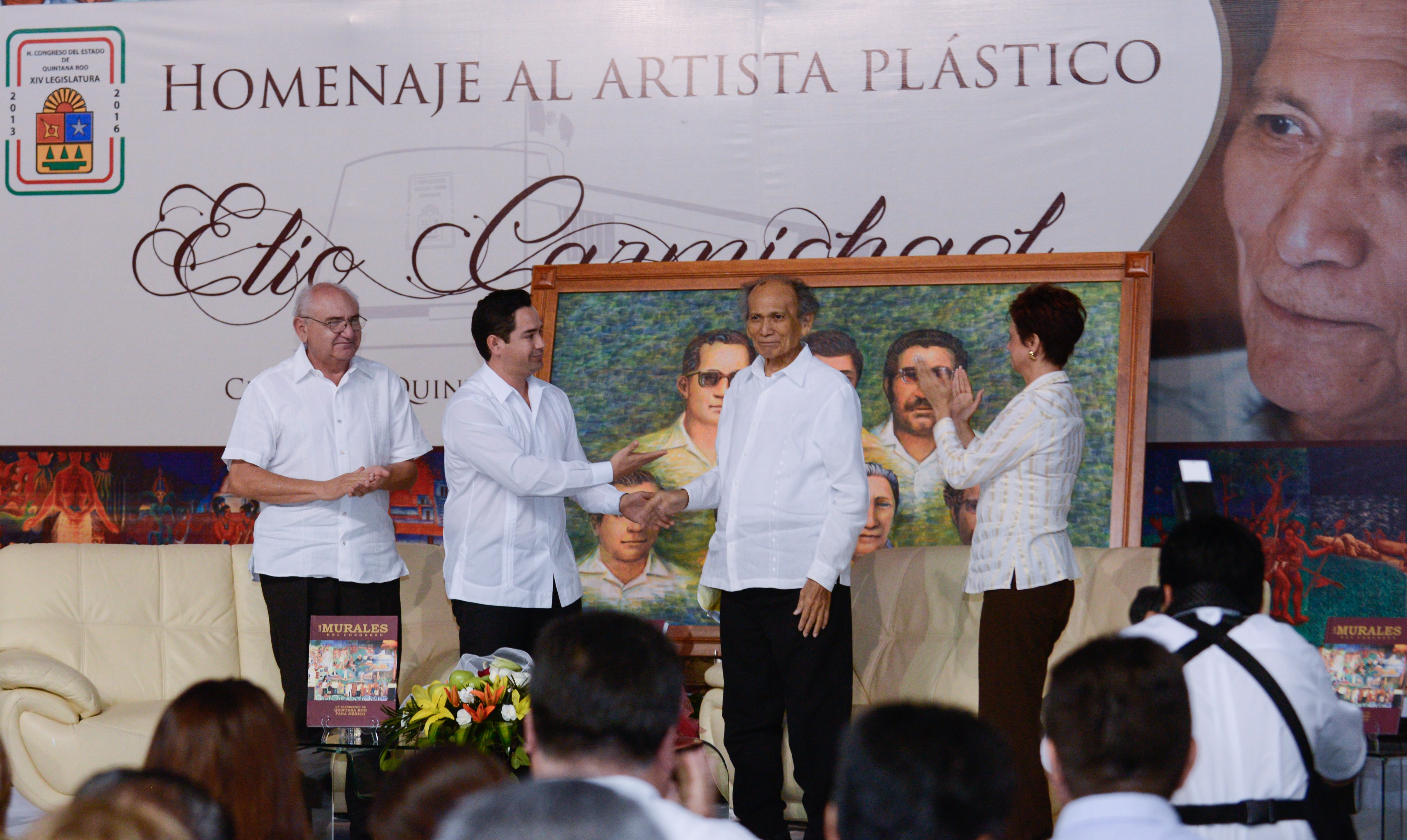 Homenaje a Elio Carmichel desde el Congreso del Estado de Quintana Roo